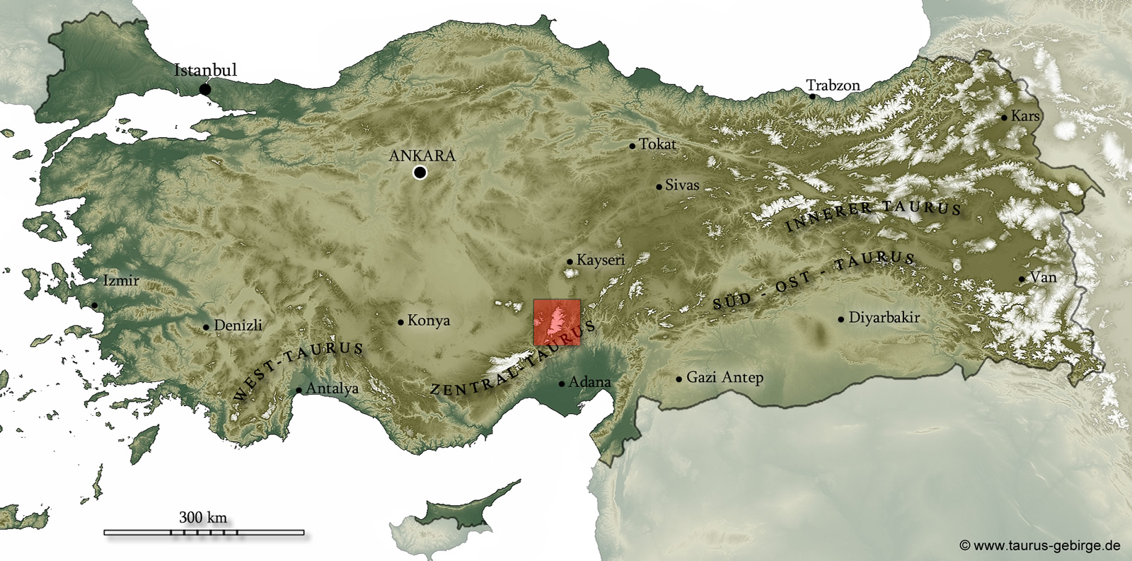 Reliefkarte (SRTM DGM) mit Spot auf das Aladaglar